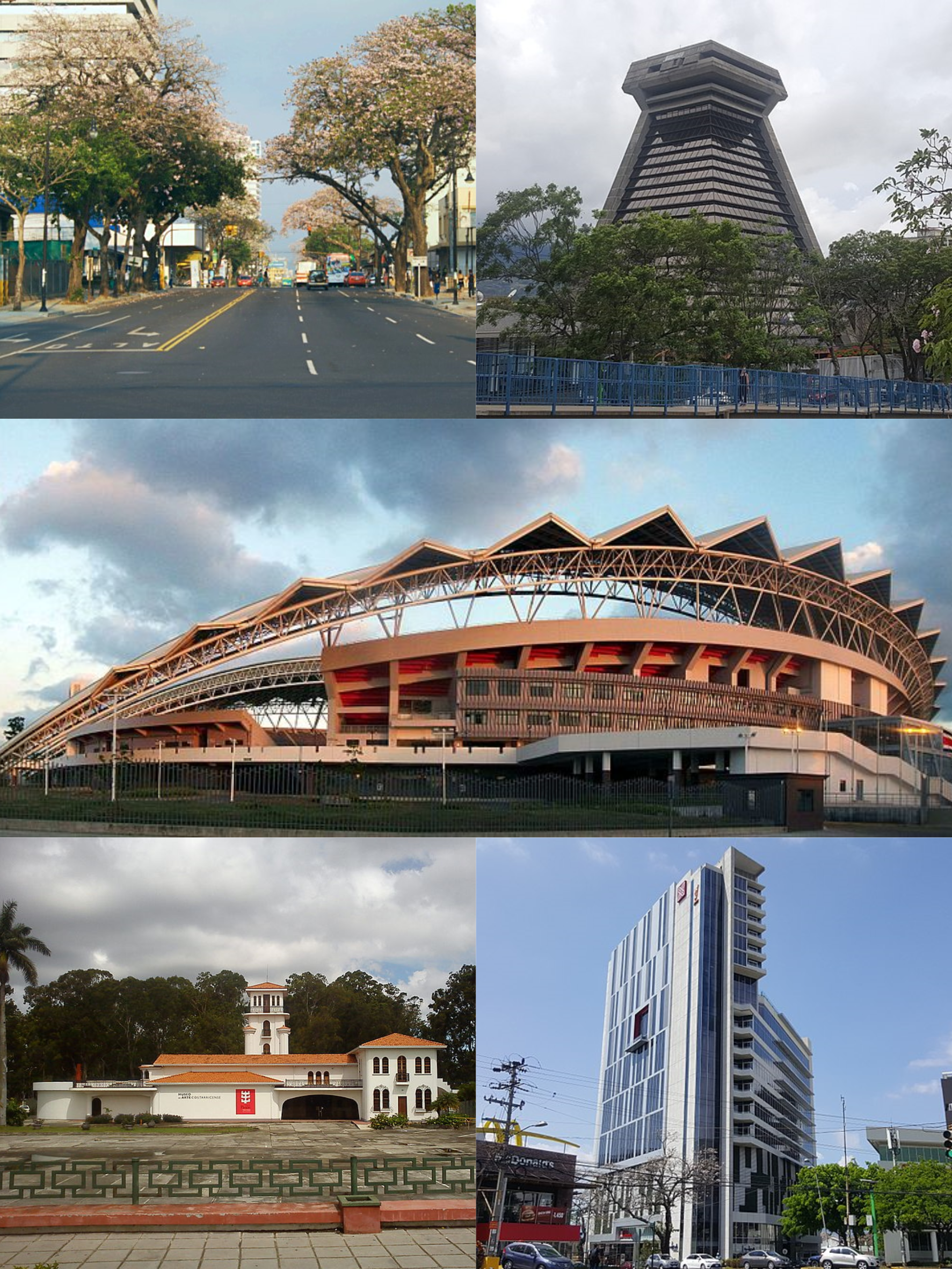 Fotomontaje del distrito de Mata Redonda de la ciudad de San José, Costa Rica.